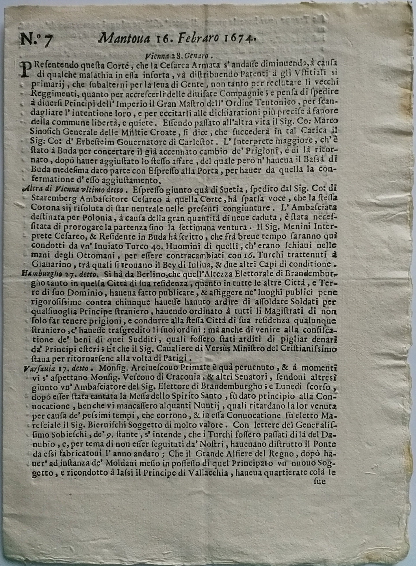 Mantova n.7 del 16 Febr 1674